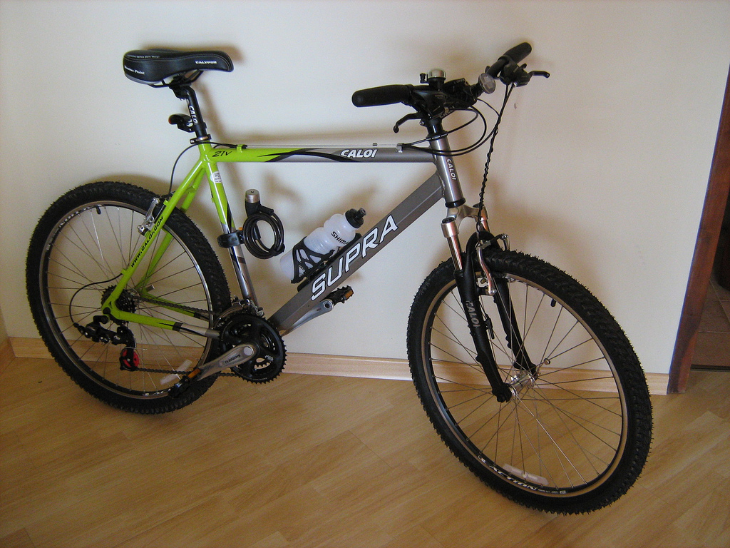 Bicicleta brasileña Caloi Supra, modelo 2008